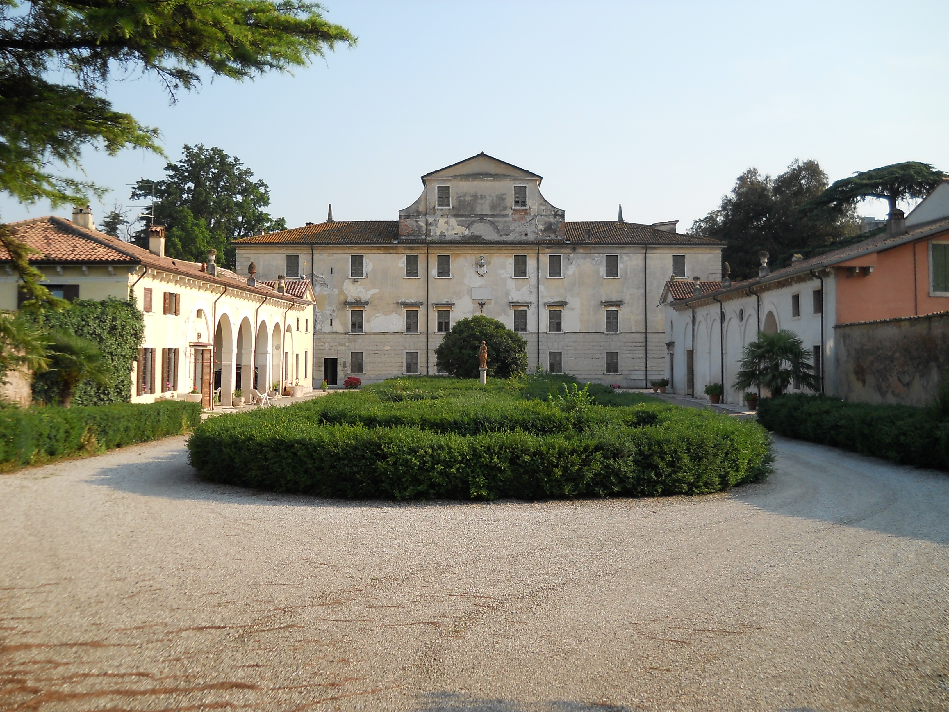 Villa Albertini-Da Sacco a Pescantina